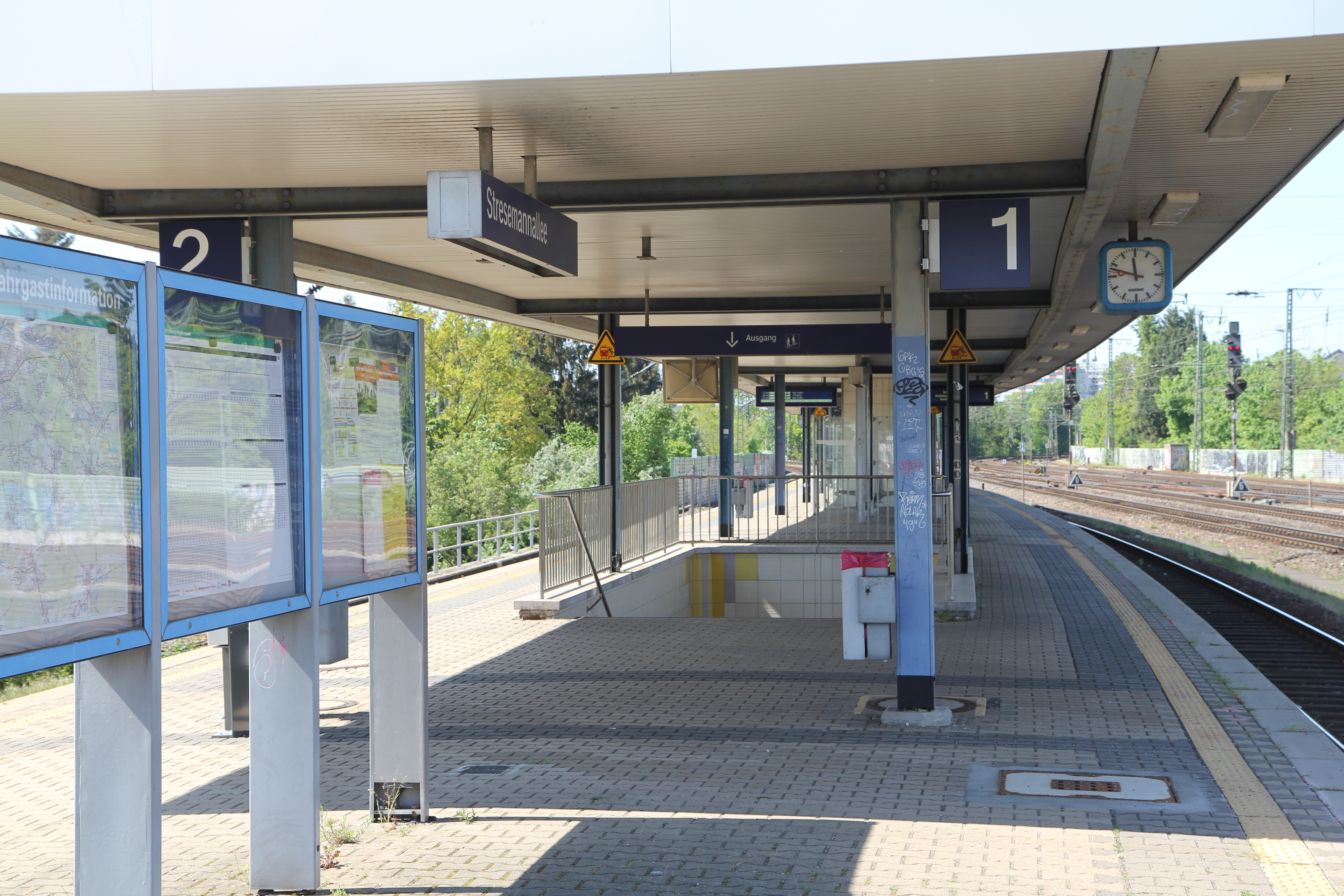 Verkehrsstation Frankfurt Stresemannallee: S-Bahn, Tram, und Bus